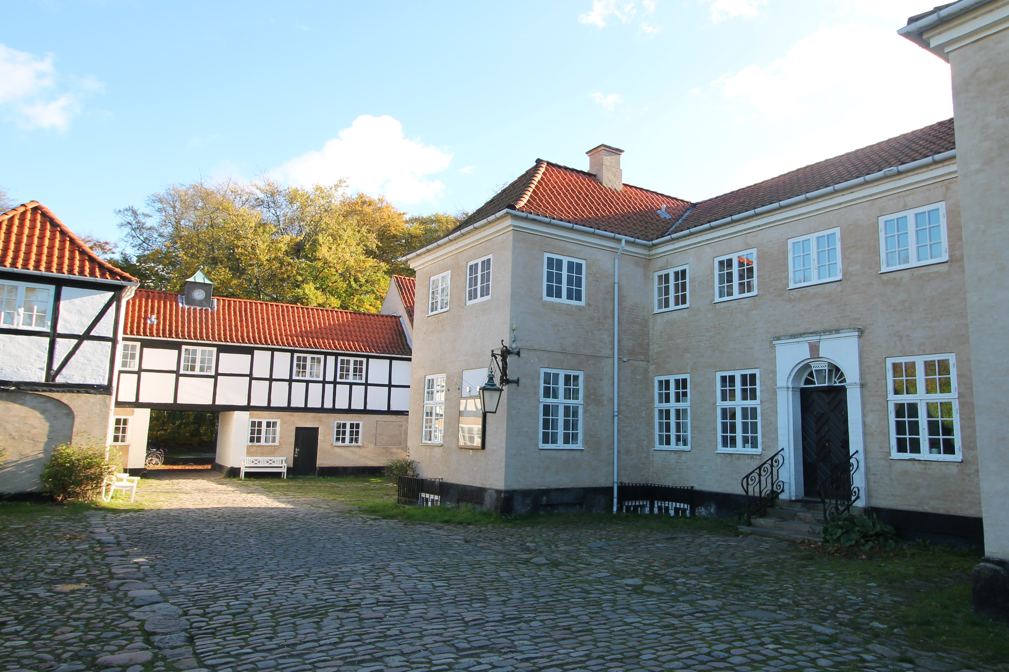 Haraldsgave